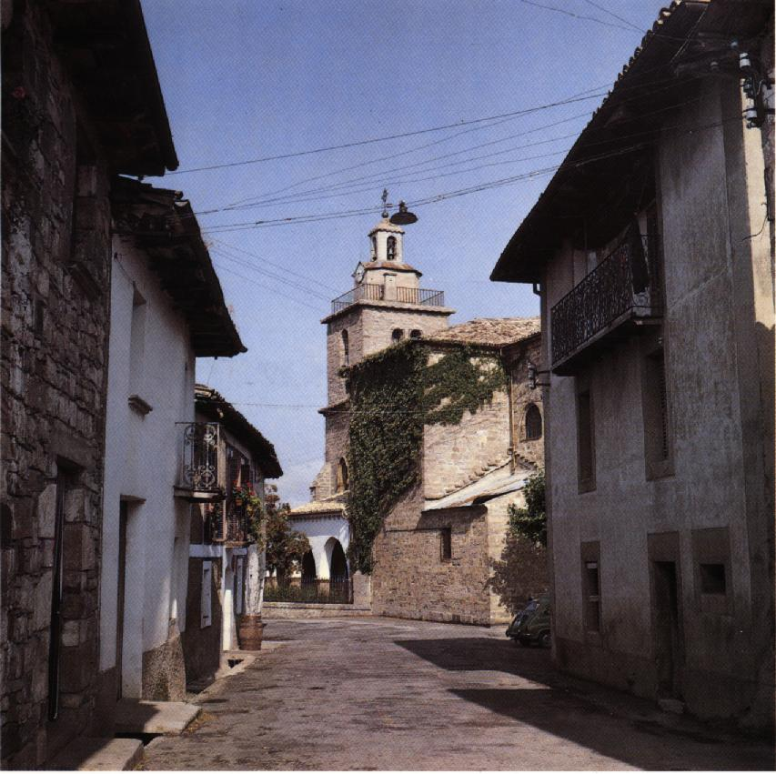 Foto de las calles de navascues